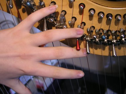 Détails des crochets d'une harpe celtique